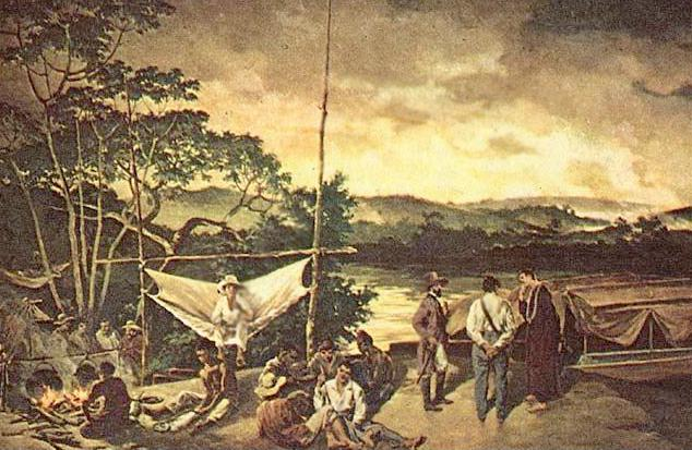 bandeirantes seculo XVIII